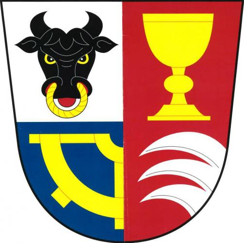 Dvakačovice znak